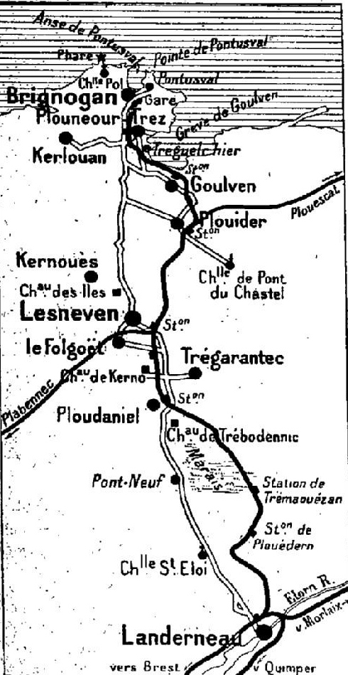 Carte du tracé de la voie ferrée allant de Landerneau à Brignogan via Ploudaniel, Lesneven et Plouider (extrait de Paul Joanne : Bretagne : les routes les plus fréquentées, Hachette, 1908